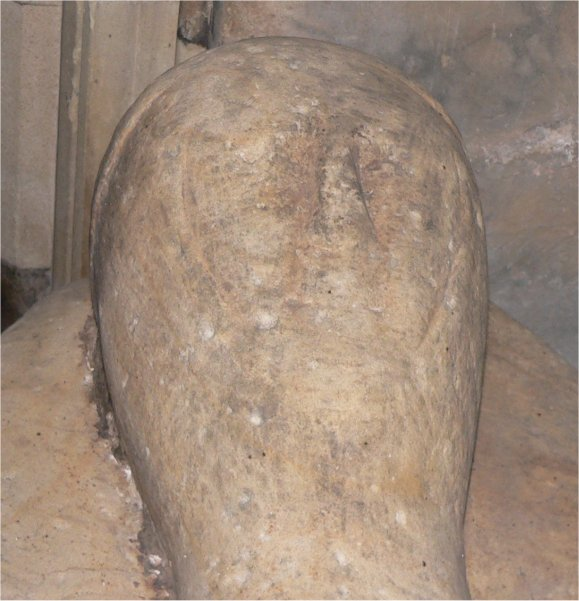 Face of the sculpture on the tomb of James Douglas, St Bride's Church, Douglas